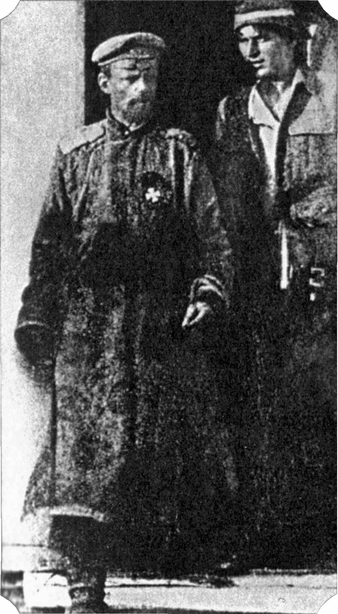 Барон Р.Ф. Унгерн в сопровождении П.Е. Щетинкина, За ним Щетинкин, Пётр Ефимович